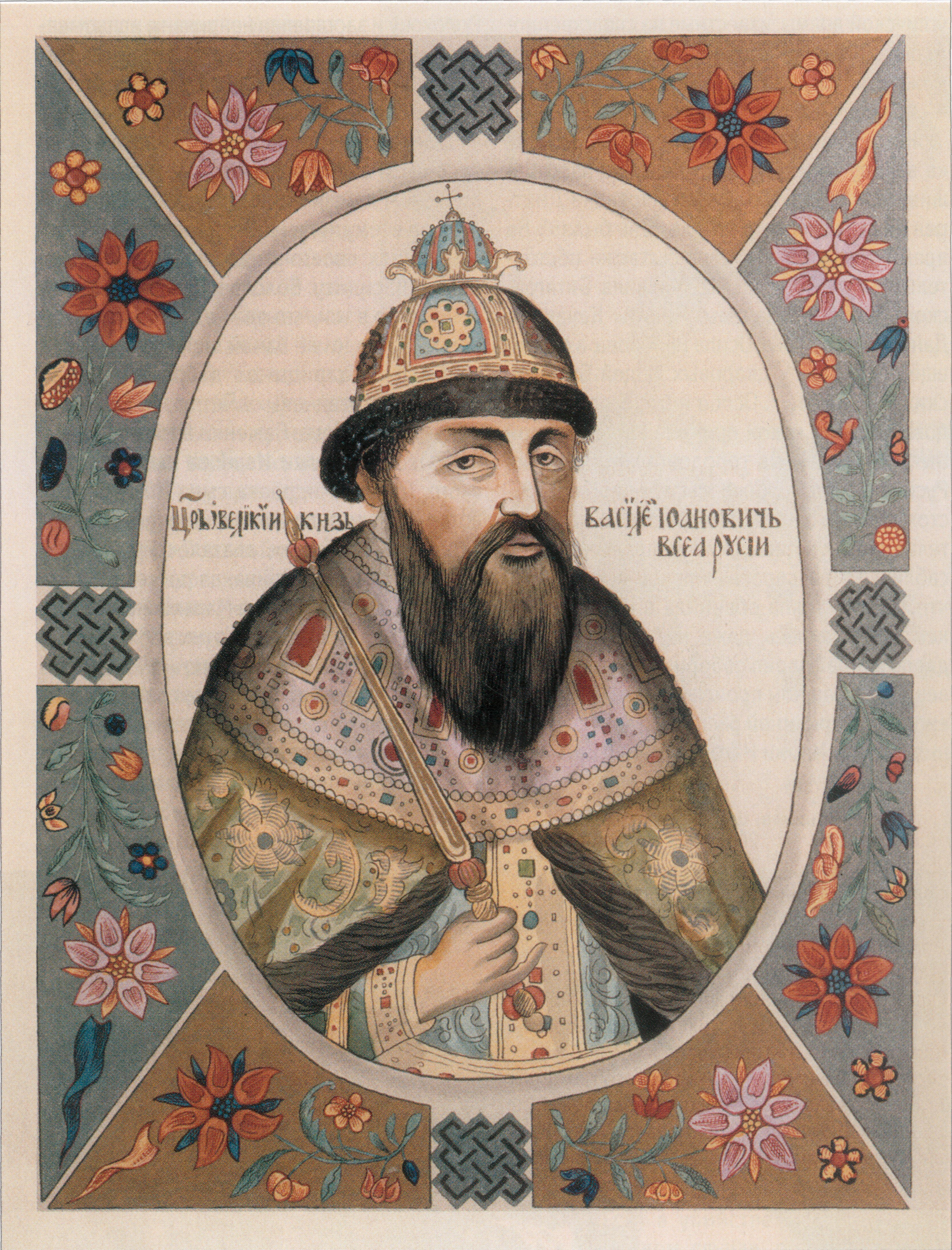 Tsar Vasili Shuysky. Miniature from 'Tsarsky titularnik', 1672. Василий Шуйский. Царь и Великий князь Василий Иоаннович Шуйский. Копия из "Титулярника" 17 века. Автор копии - В.Н. Нечаев, 1887